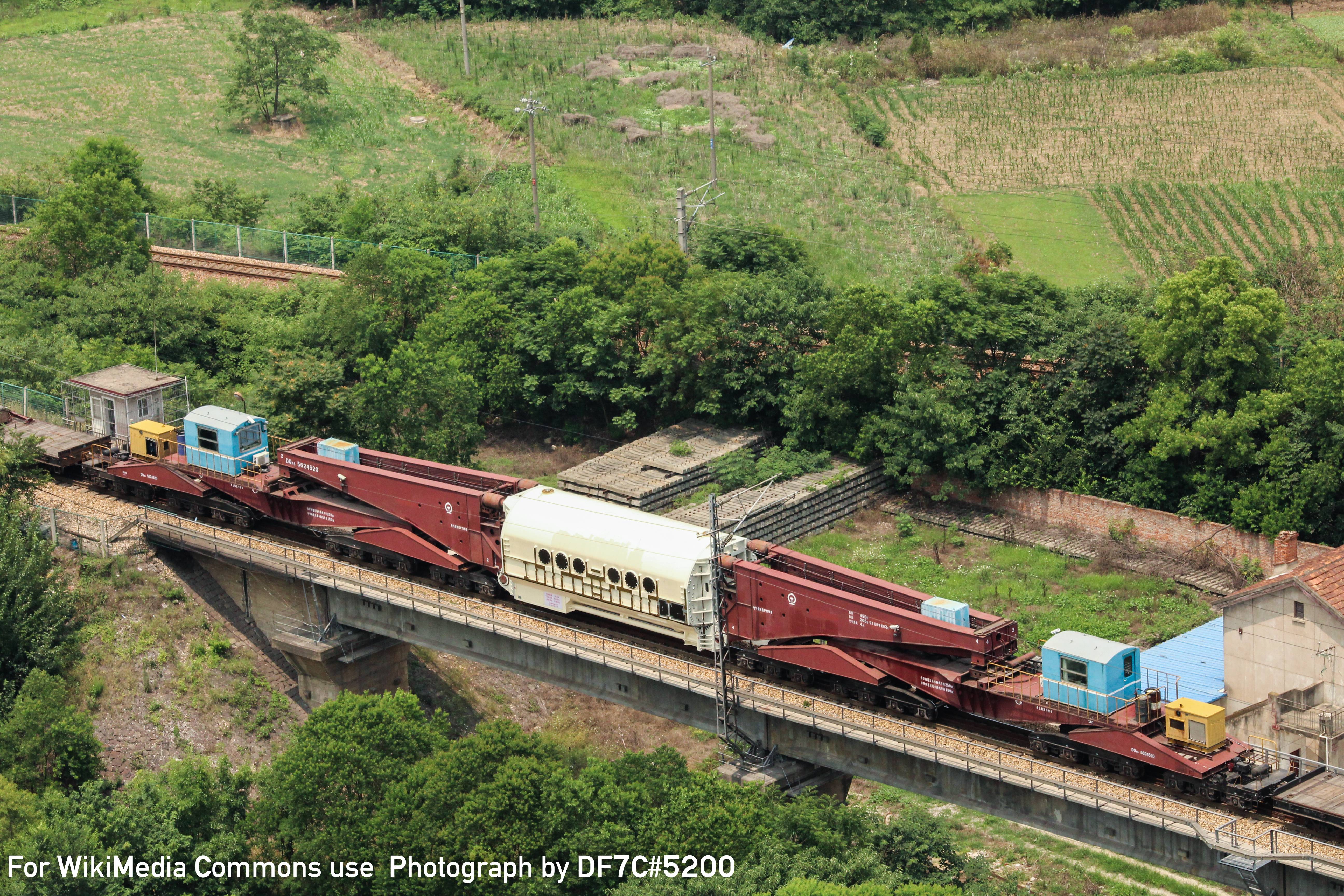 2017年7月4日，中国铁路DQ45型钳夹式长大货车运送定子通过京沪铁路曹山外绕线